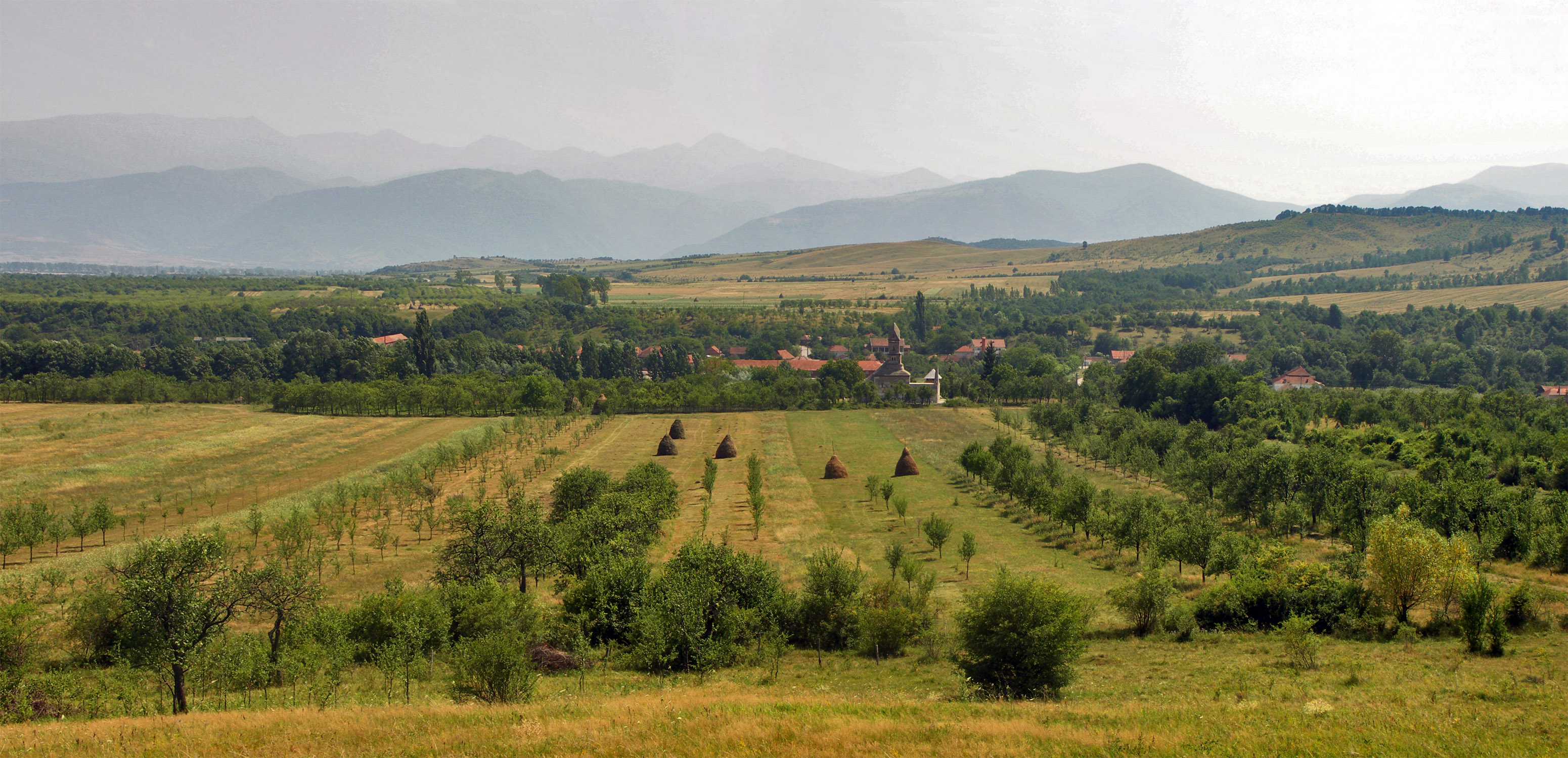 Densuş, Hunedoara: panoramă peste sat spre miazăzi.